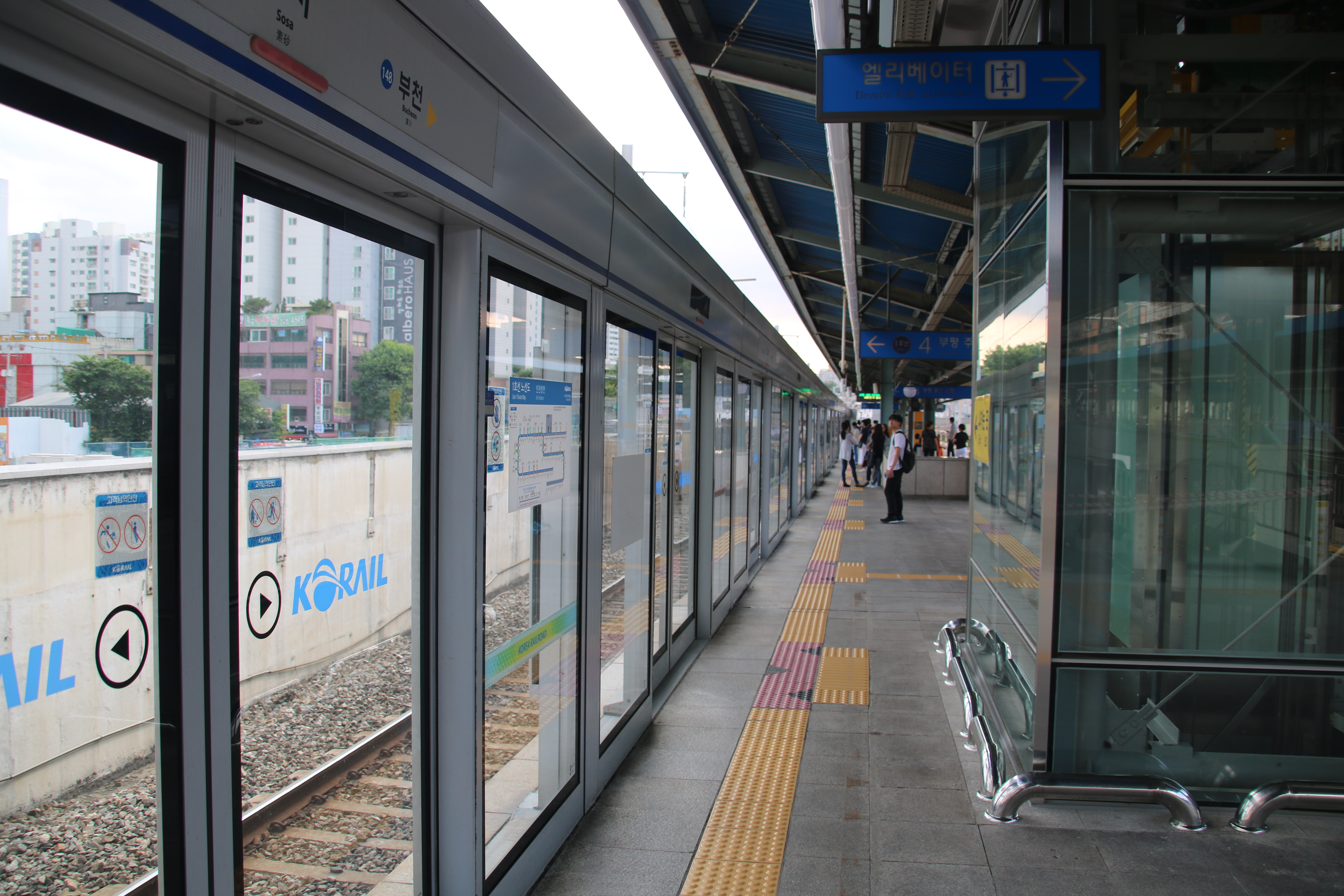 1호선 승강장(인천방면)